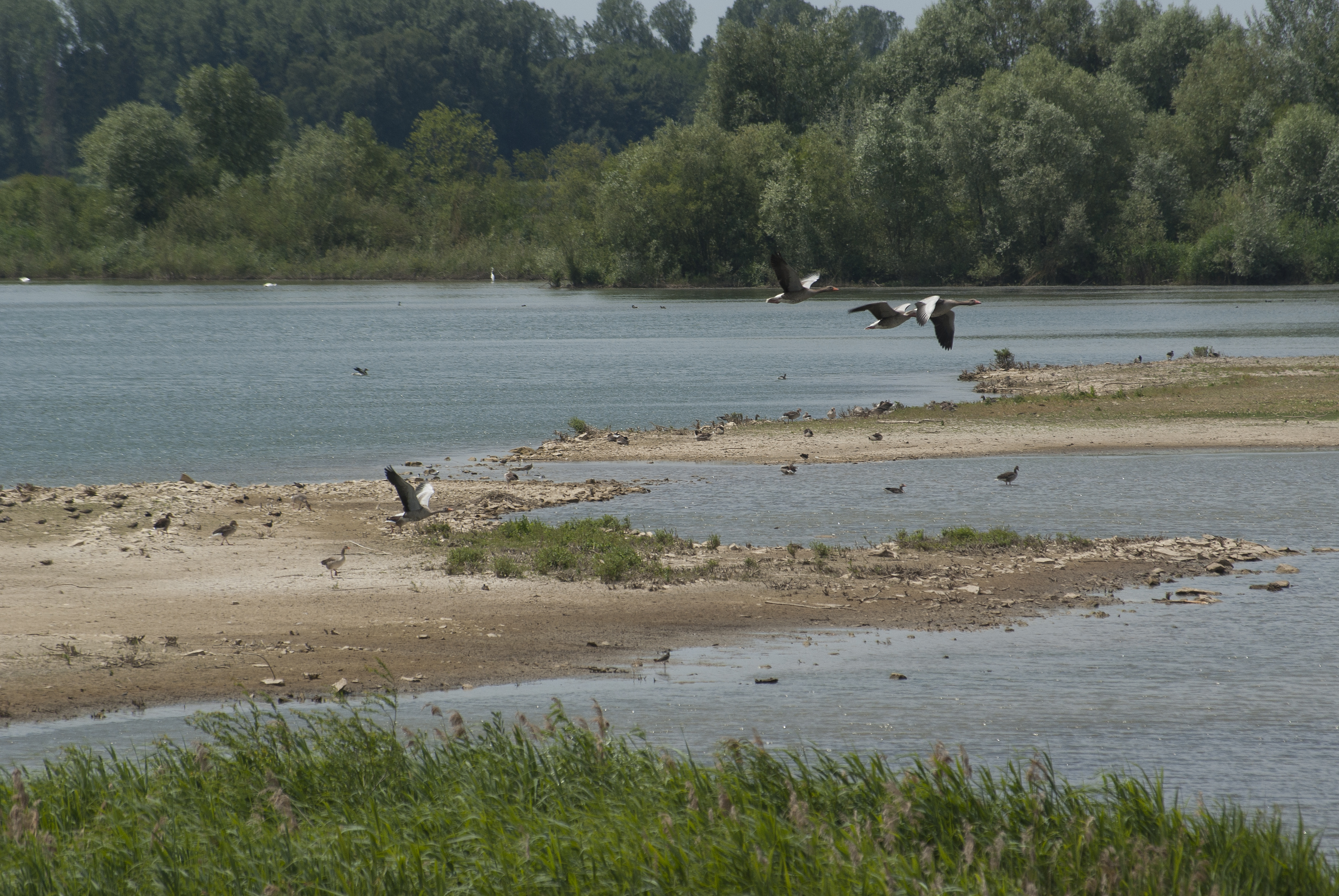 Das Gundelfinger Moos ist das erste NSG de Regierung von Schwaben 1983 in Kraft gesetzt. 60% sind landwirtschaftlich genutzt. Brutvorkommen des großen Brachvogels. Enge Verknüpfung zu angrenzenden Auwaldflächen.